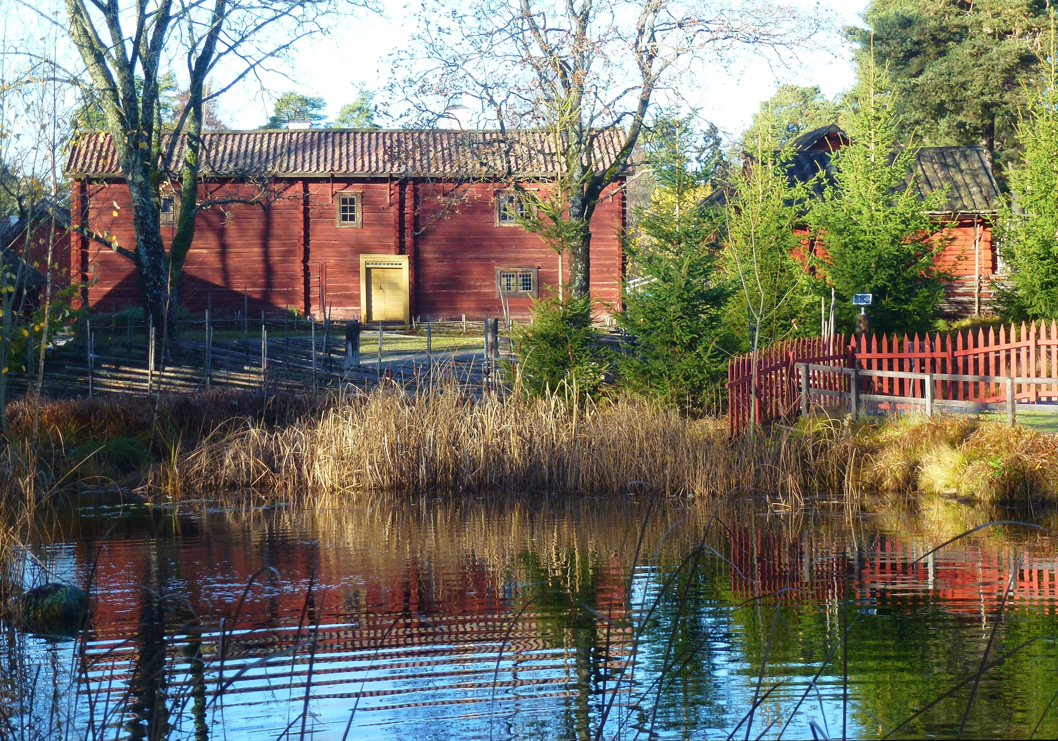 Råbygården, Torekällberget